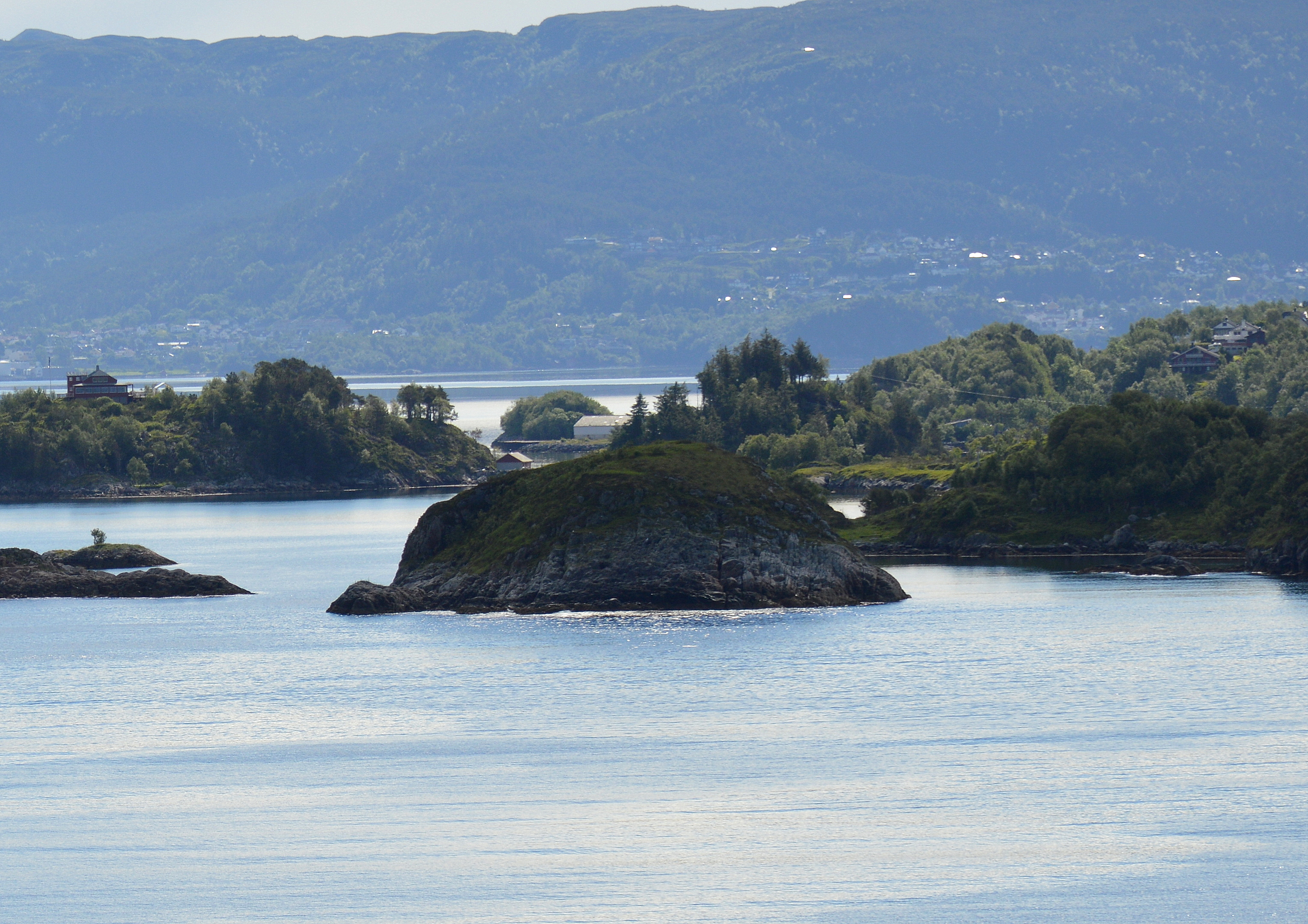 Insel Brattholmen in Sula